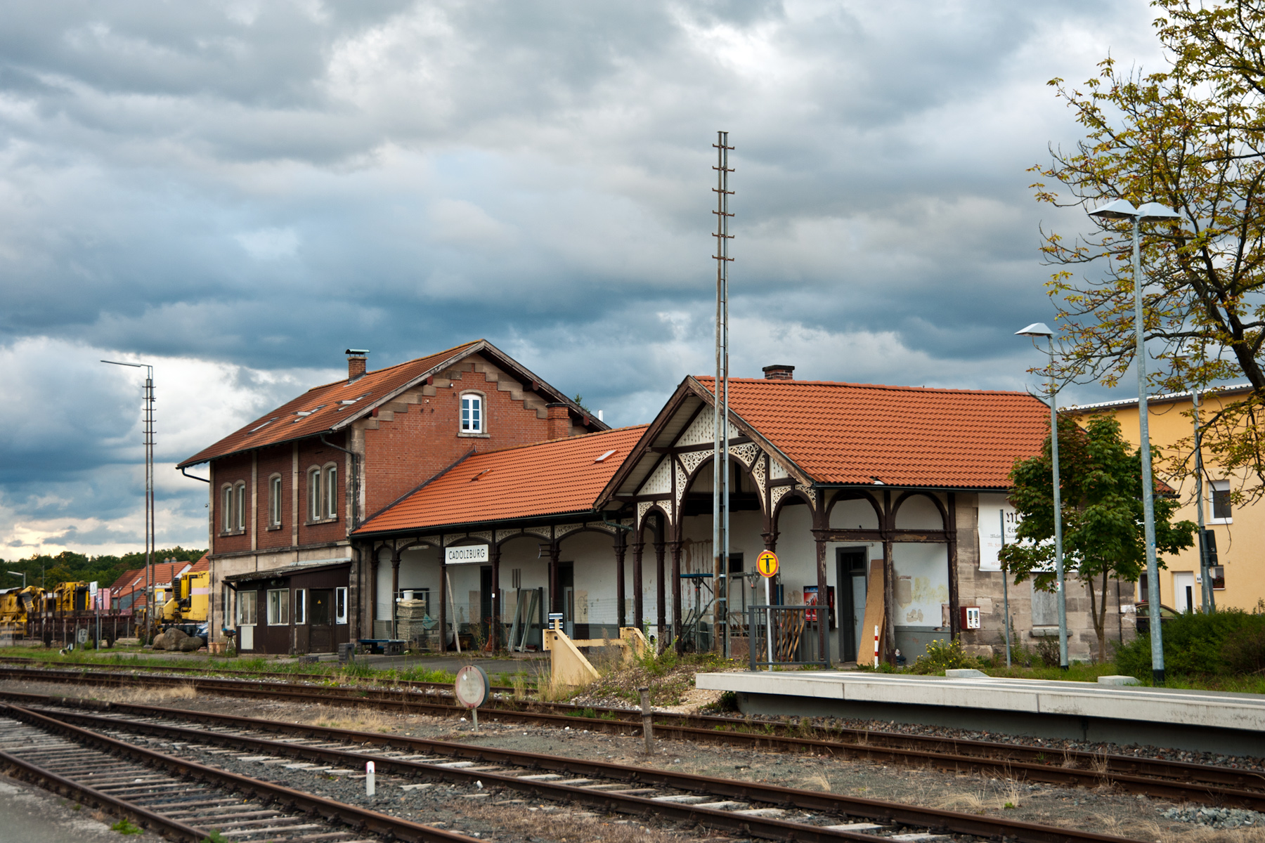 Bahnhof Cadolzburg This is a photograph of an architectural monument.